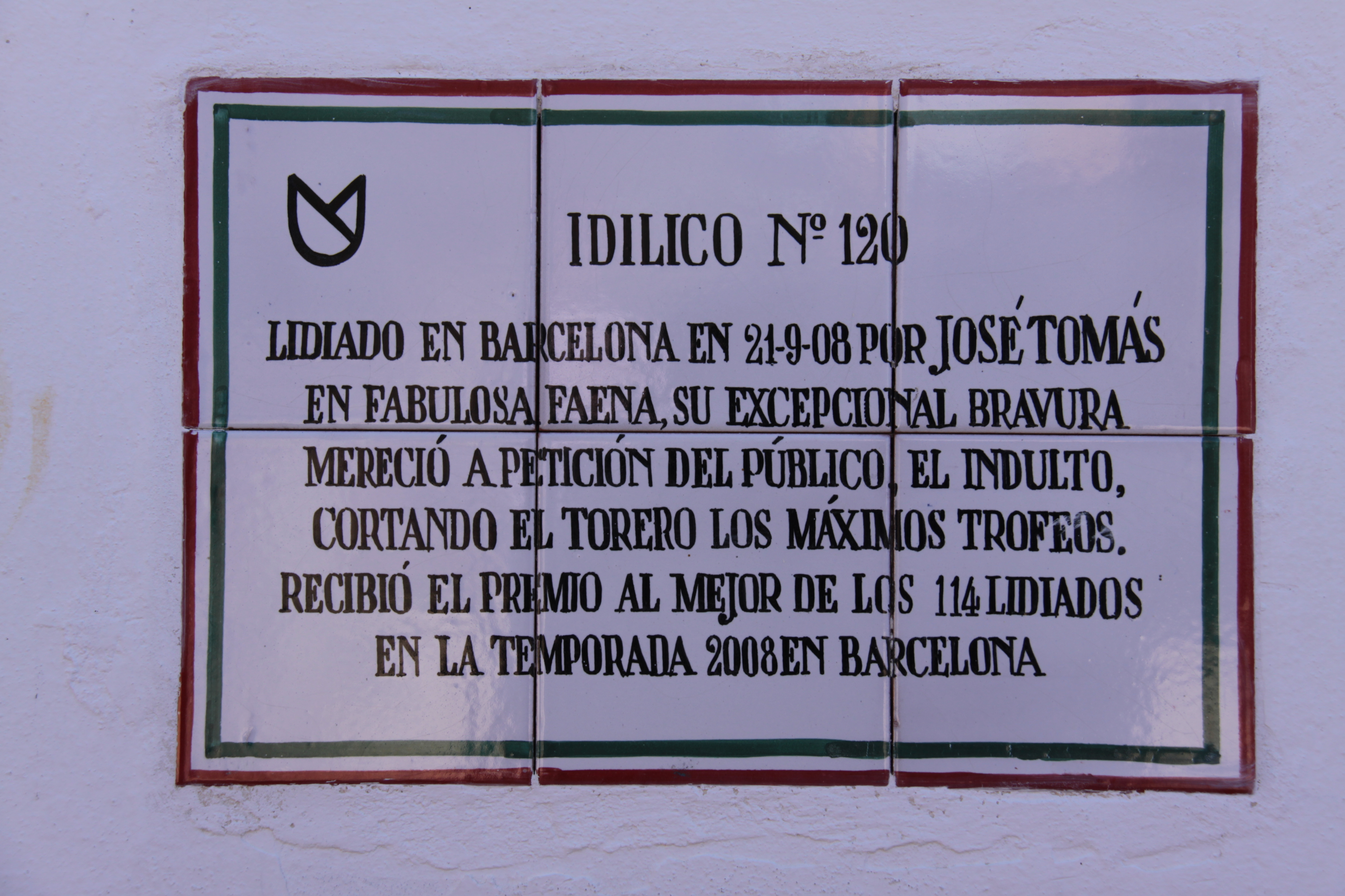 Azulejo de la ganadería de Núñez del Cuvillo donde se hace memoria del indulto del toro Idílico, lidiado en Barcelona por José Tomás